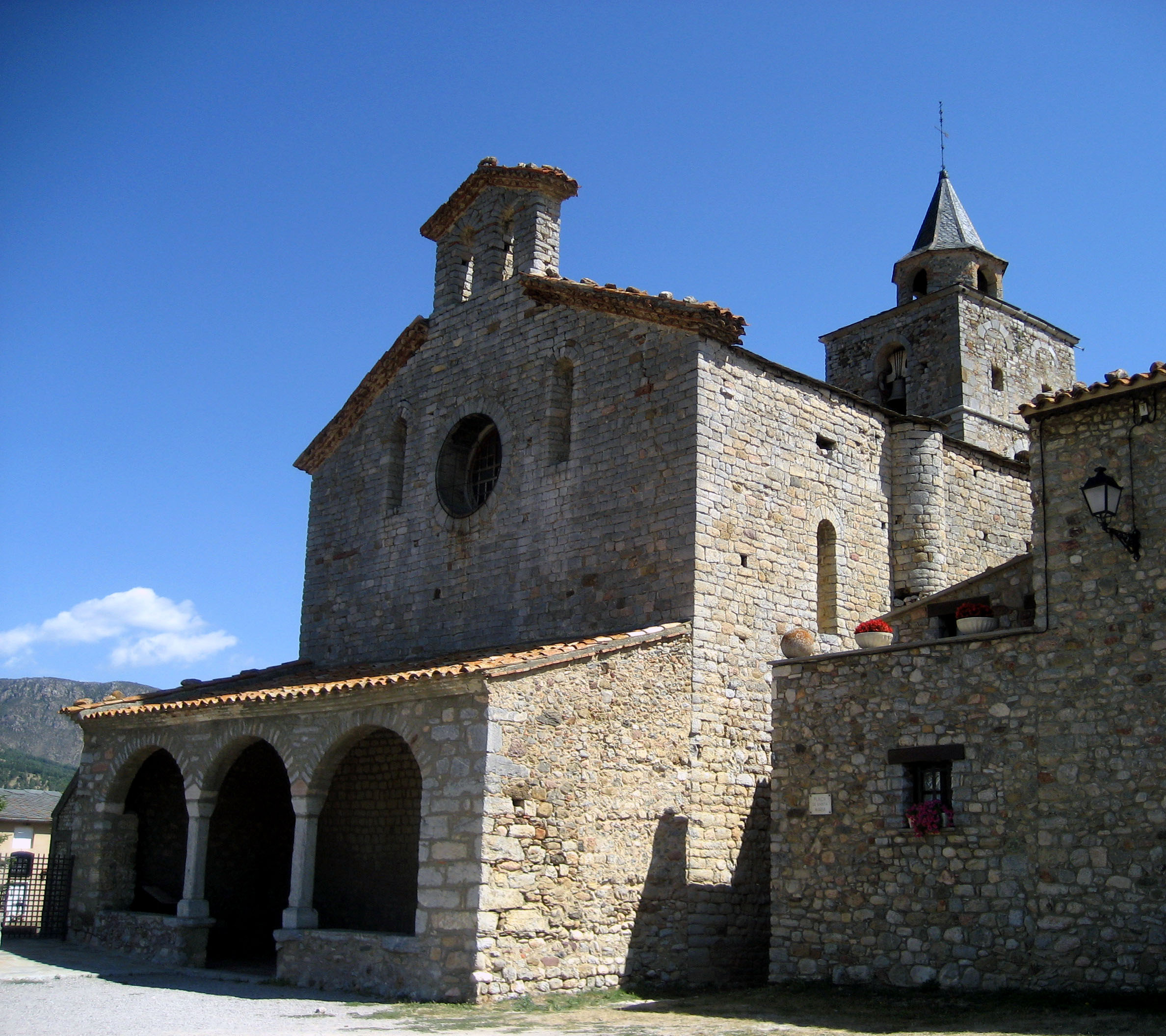 Santuari de Santa Maria de Talló. Baixa Cerdanya. Catalunya